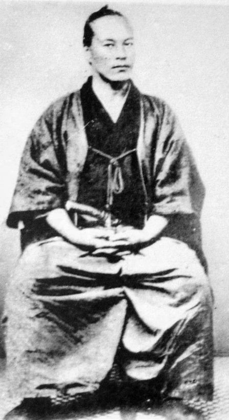 a Japanese man 山岡鉄舟 (Tessyu Yamaoka)